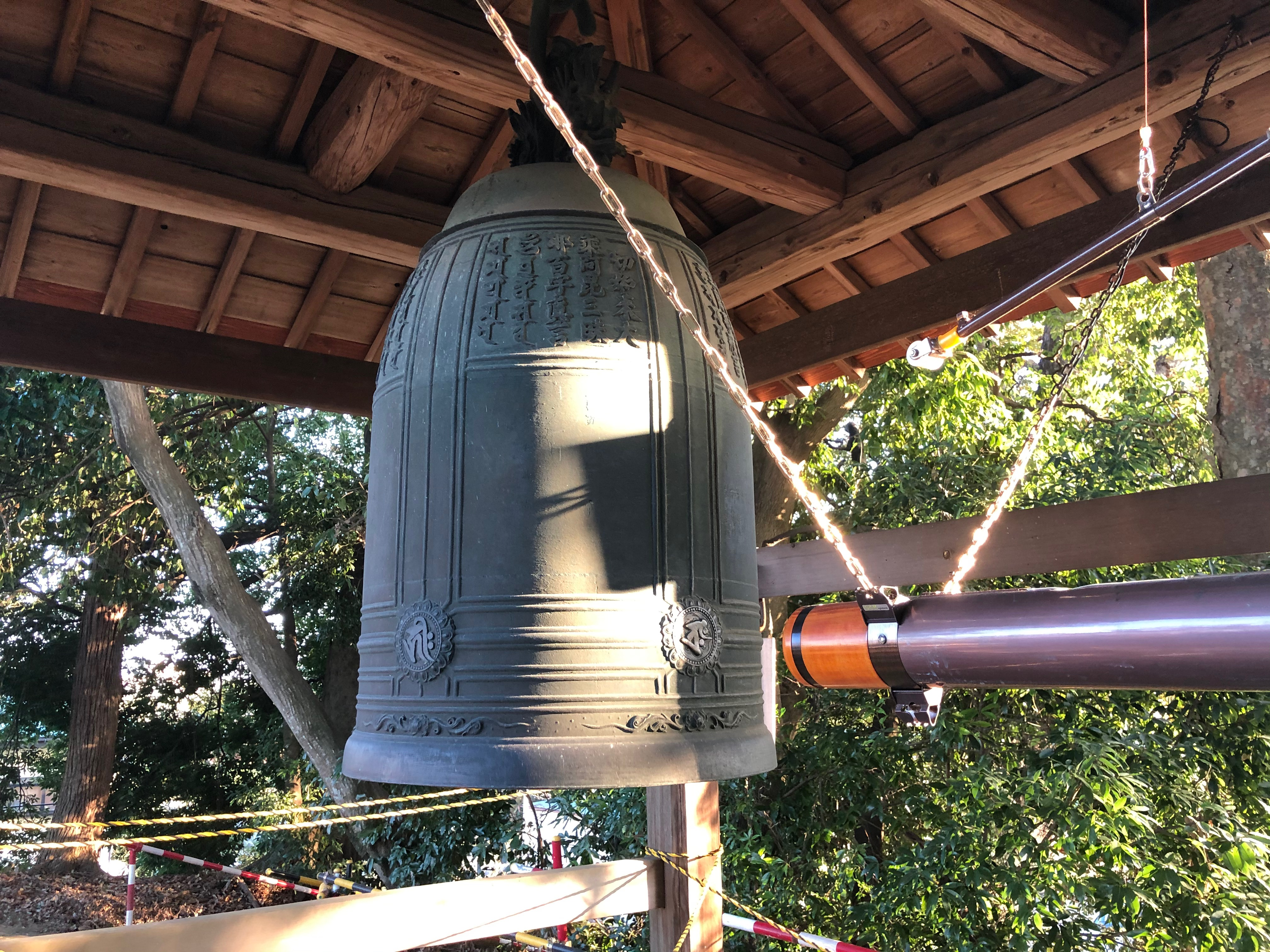 赤岩山光恩寺、梵鐘